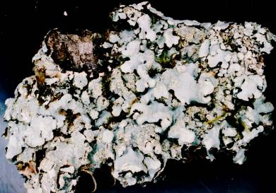 Myelochroa aurulenta